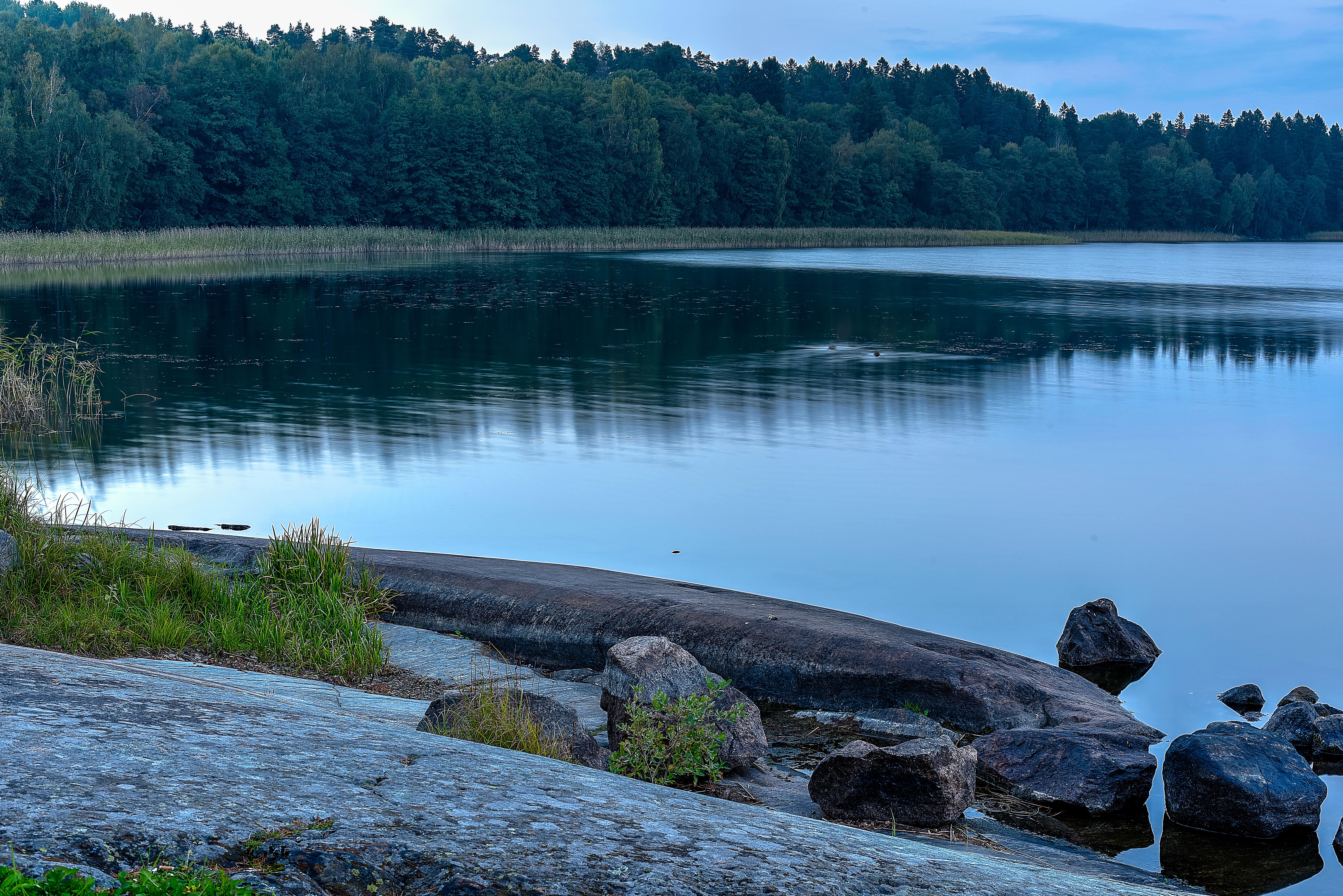 Lens: Nikon 50mm AF-S f/1.8 G